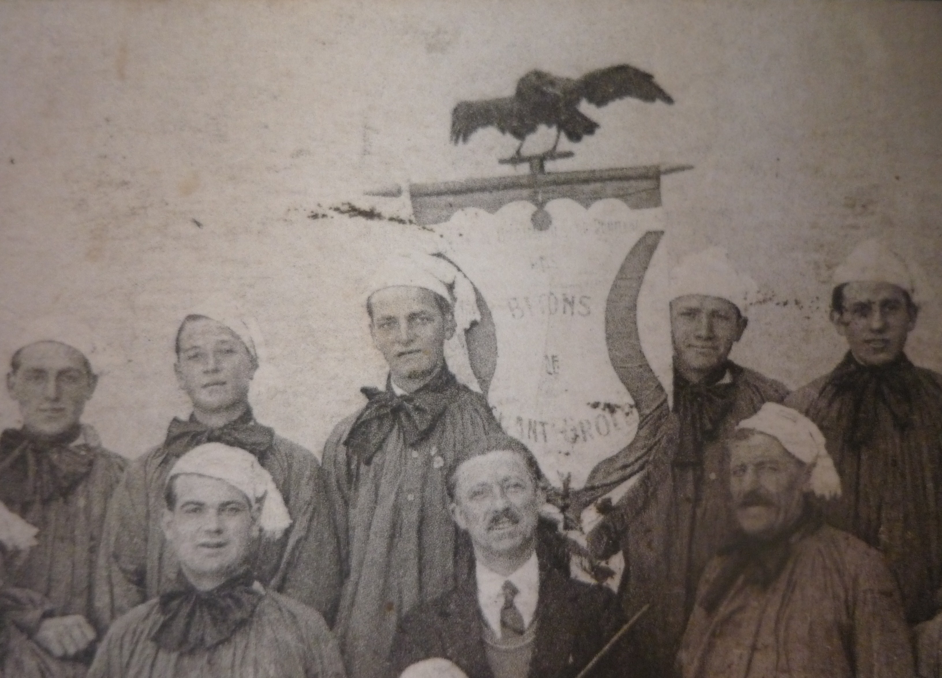 Détail de la photo de groupe : la bannière surmontée par un corbeau naturalisé.